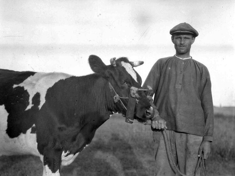 Bauer mi Kuh in Morsum